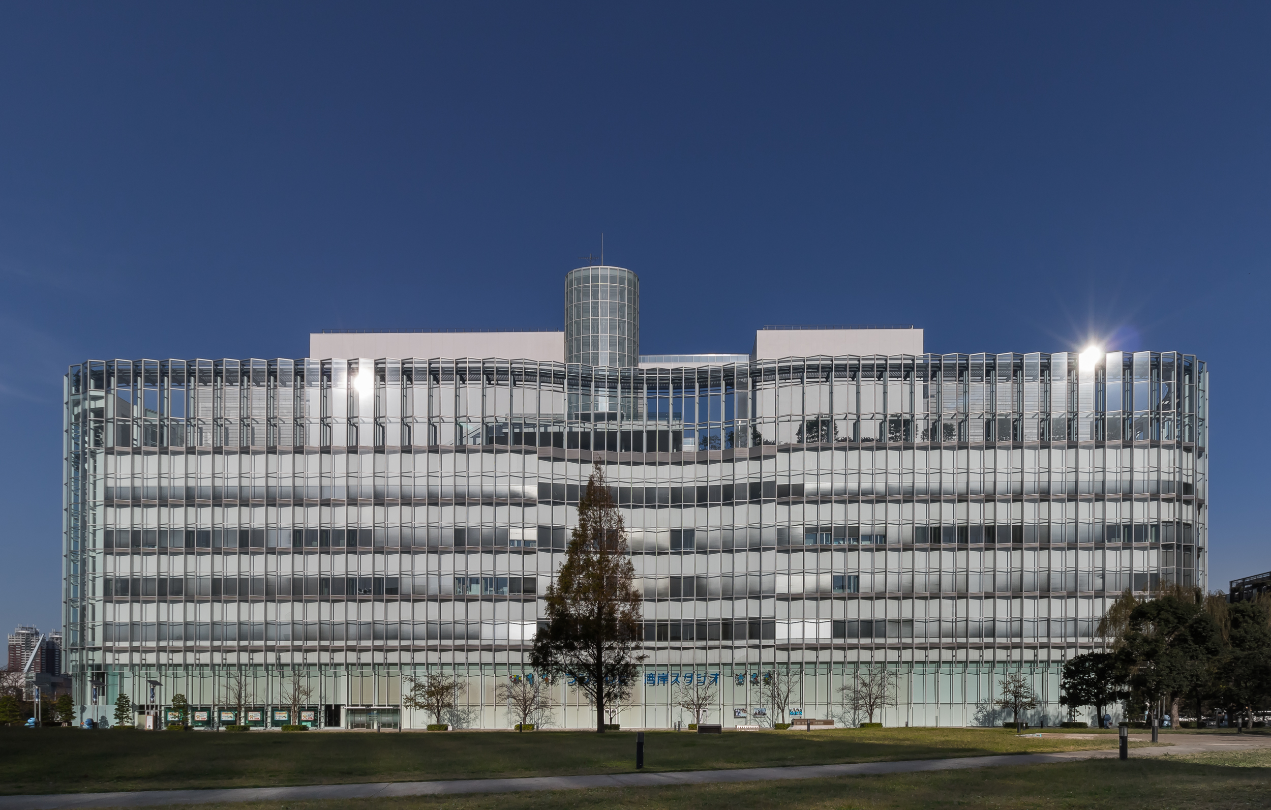 フジテレビ湾岸スタジオ（東京都江東区）